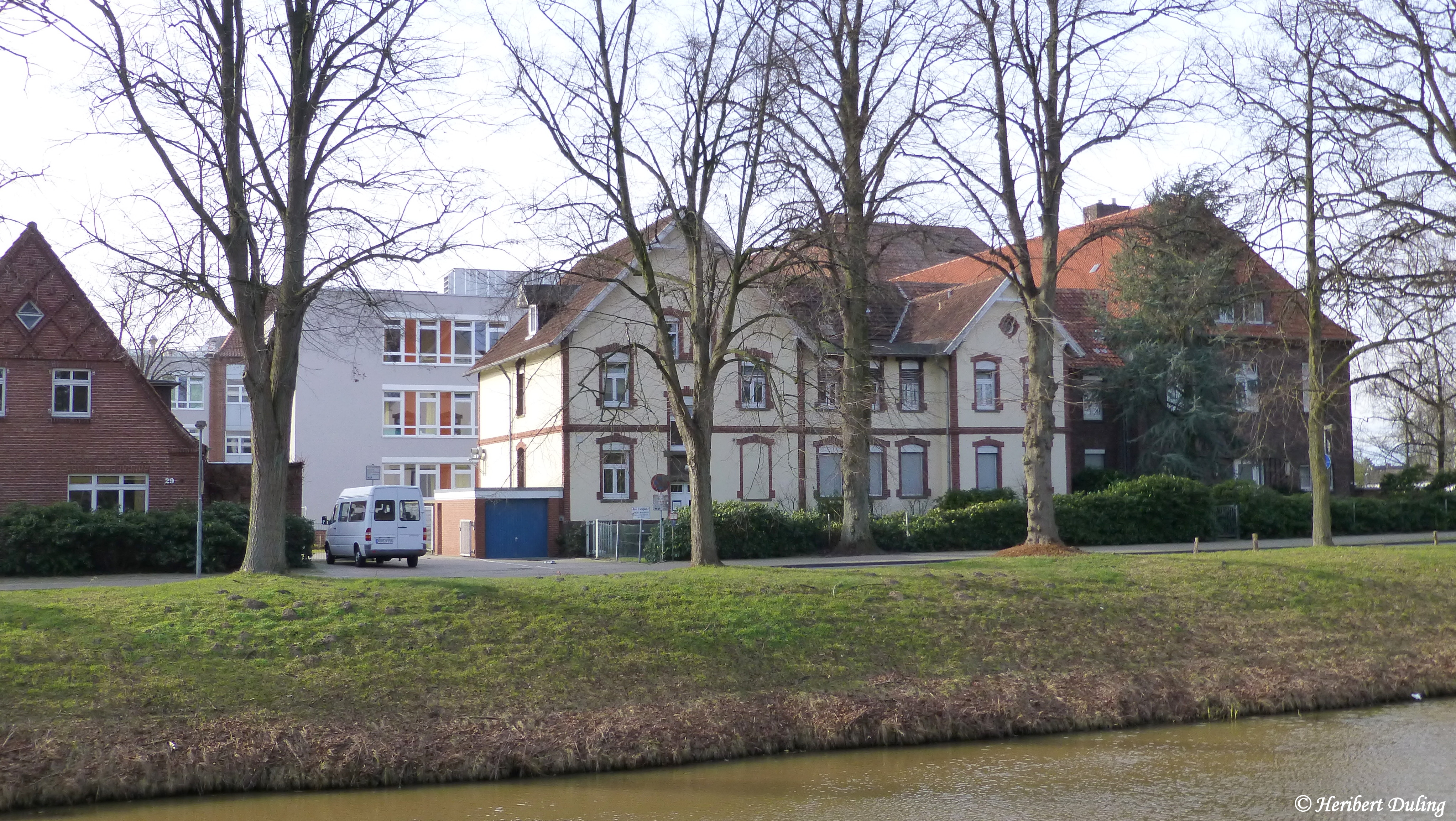 Gründungsgebäude der heutigen Euregio-Klinik